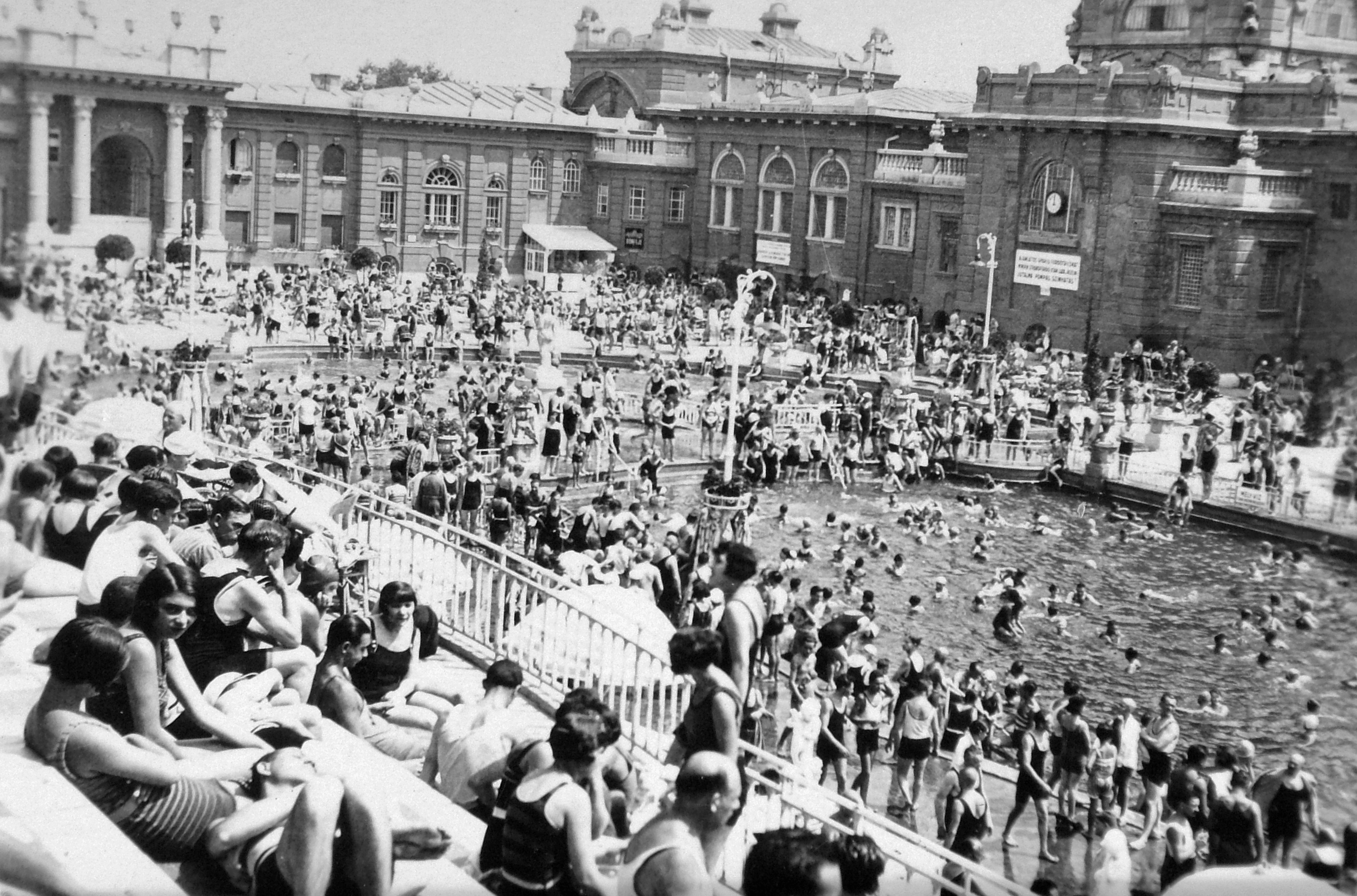 Széchenyi fürdő. Location: Hungary, Budapest XIV. Tags: Budapest Title: Széchenyi fürdő.